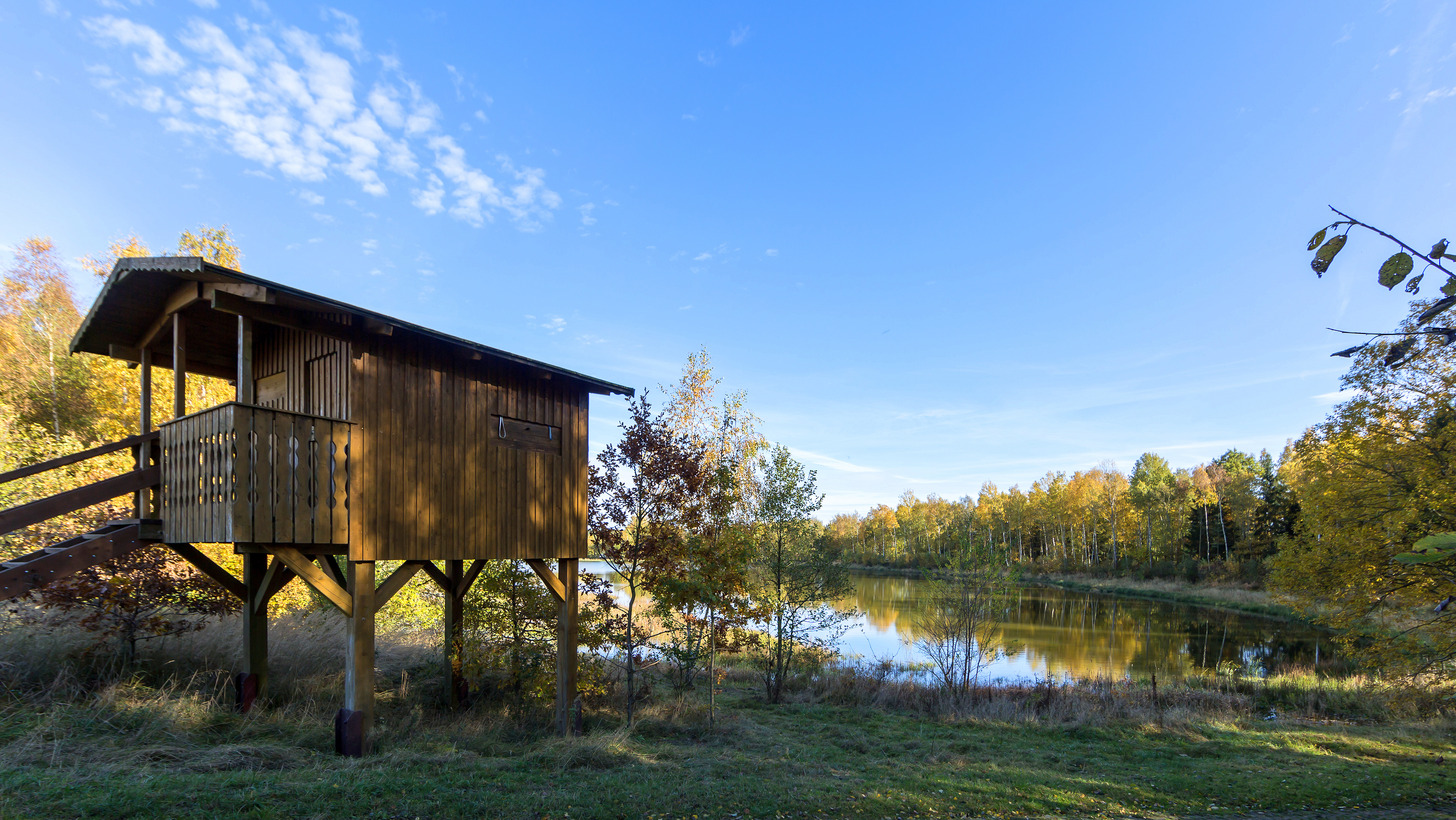 Beobachtungsturm am Födisch-Teich in Dreba, gelegen im Naturschutzgebiet „Dreba-Plothener Teichgebiet“, im FFH-Gebiet DE-5336-302 „Dreba-Plothener Teichgebiet“ und im Landschaftsschutzgebiet „Plothener Teichgebiet“